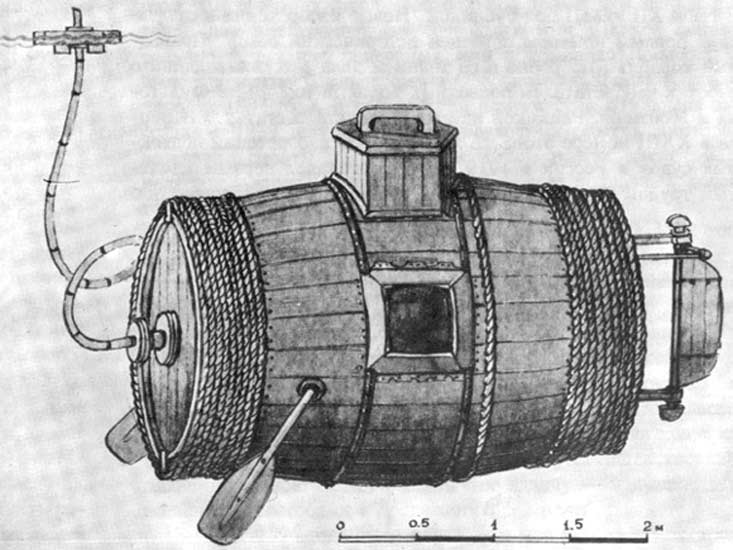 потаенное судно никонова первая модель русской подлодки 1721 года